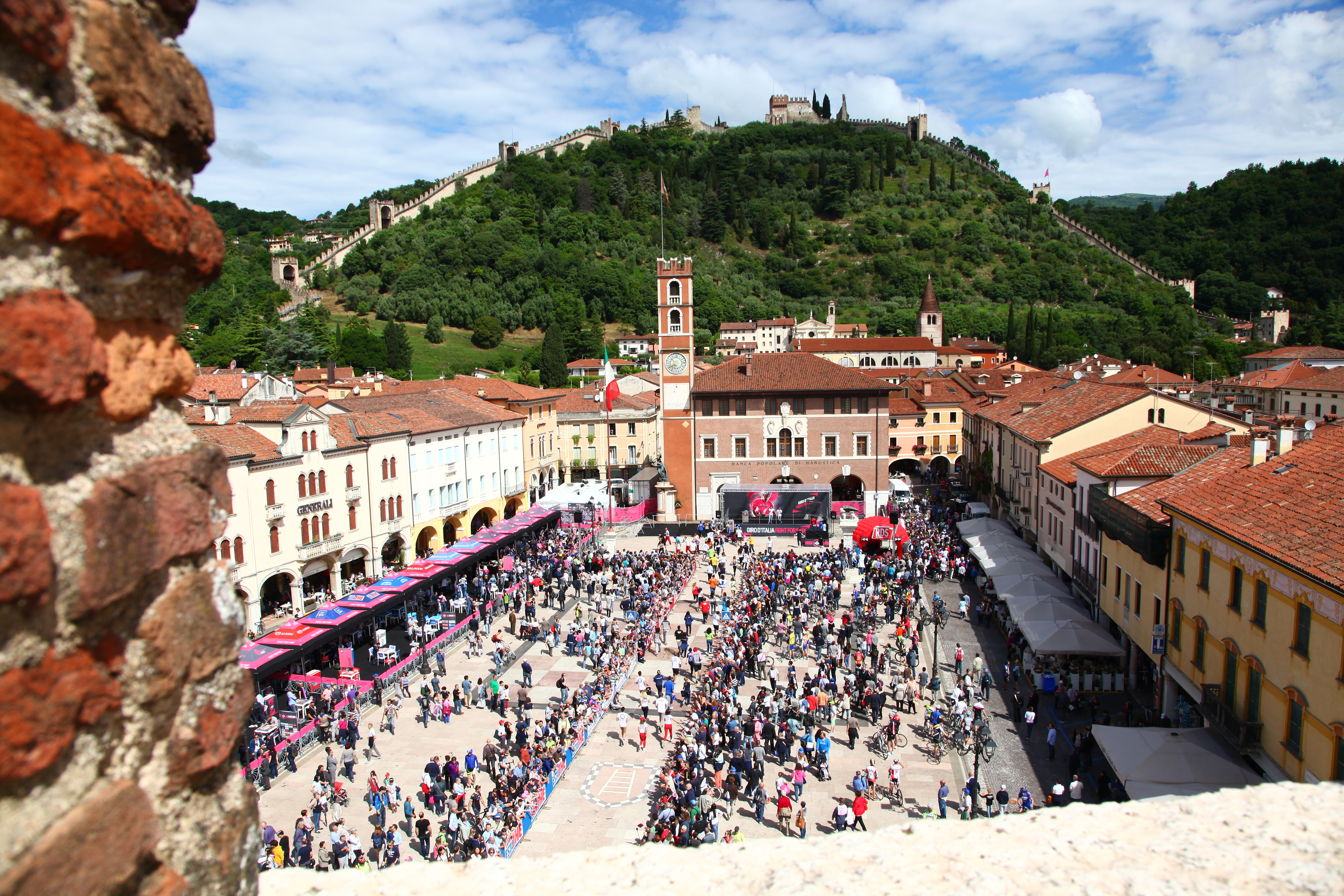 Vista della Piazza degli Scacchi e del Castello Superiore di Marostica durante il giro d'Italia del 2015. This is a photo of a monument which is part of cultural heritage of Italy.